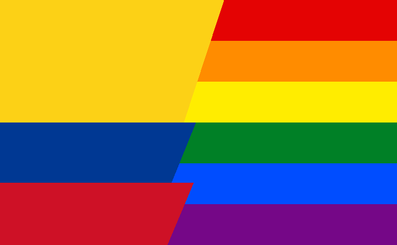 Bandera gay Colombia.